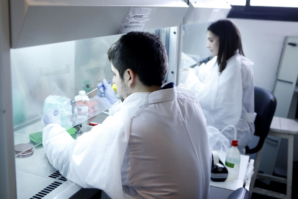 Científicos de la Universidad Nacional de La Plata, trabajando en investigaciones.